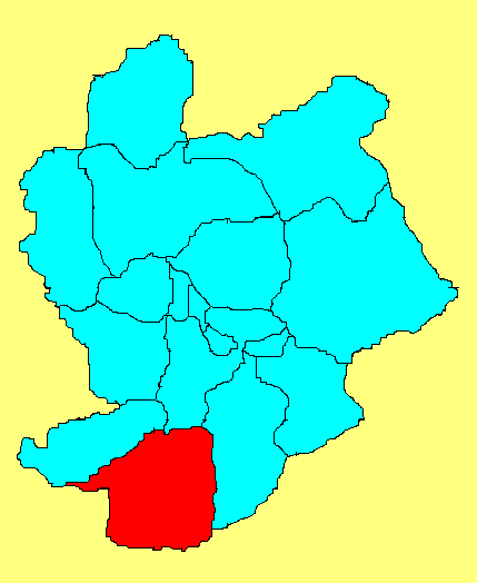 蔚县在张家口市的位置；此图片由王云峰wangyunfeng原创，用于WIKI。